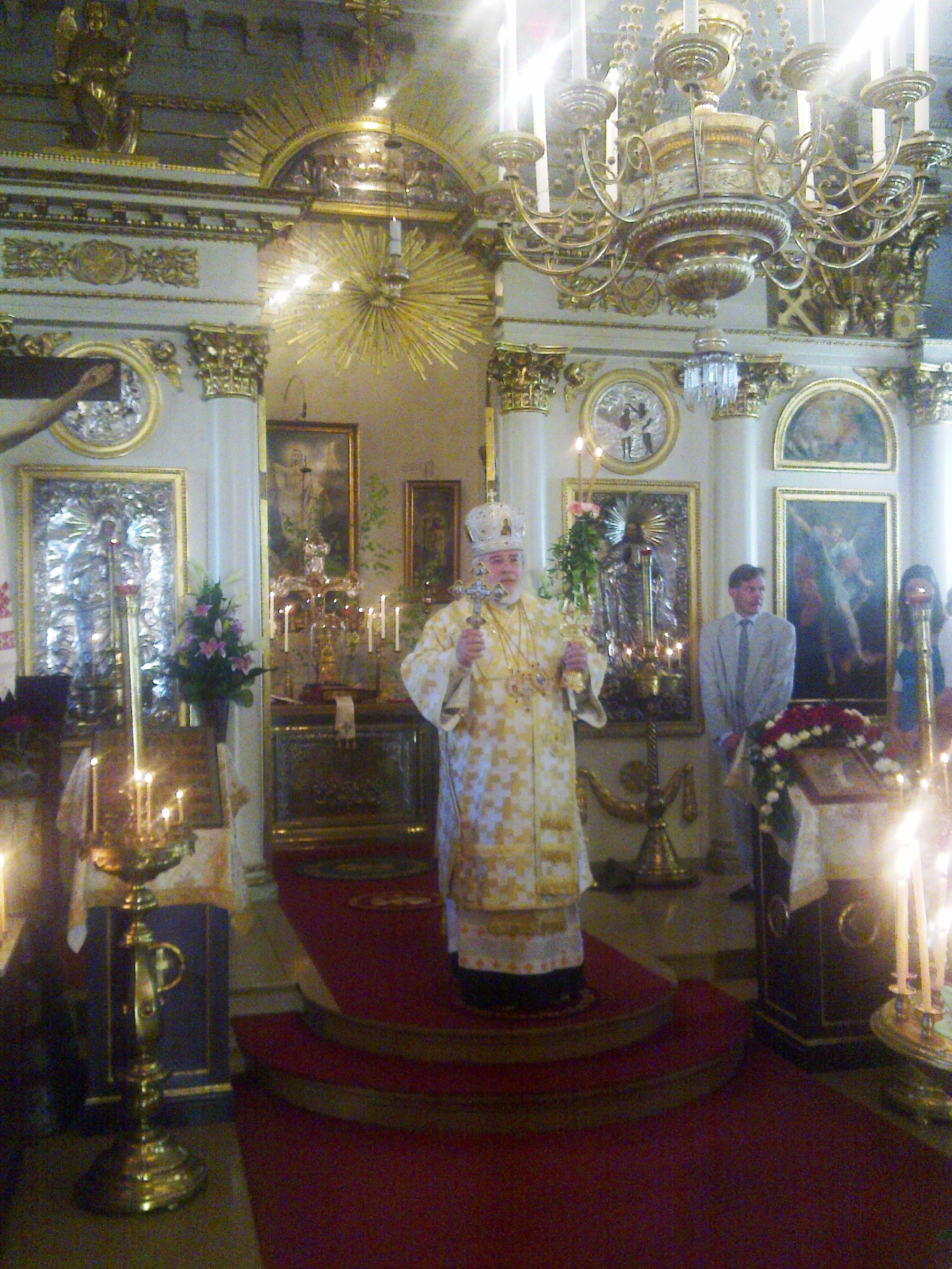 Archbishop Leo of the Finnish Orthodox churc.